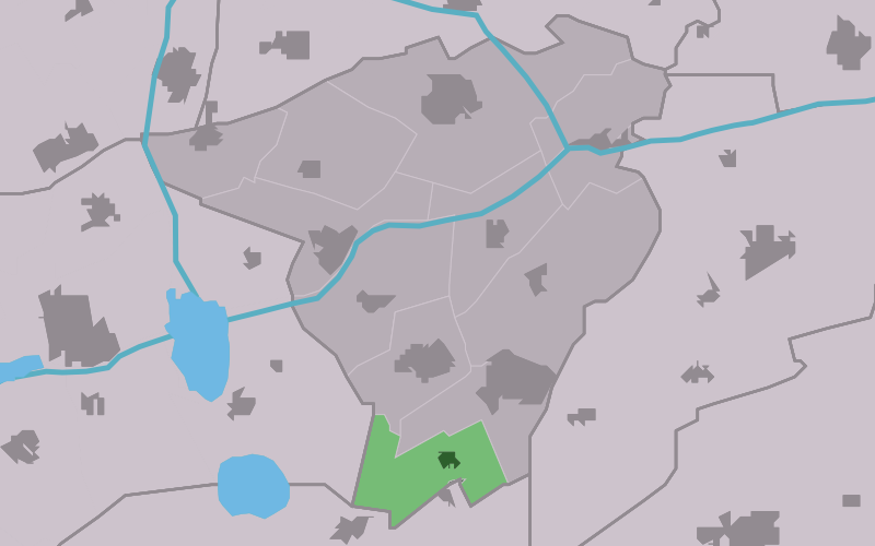 Kaartsje fan himrik fan Boelensleane